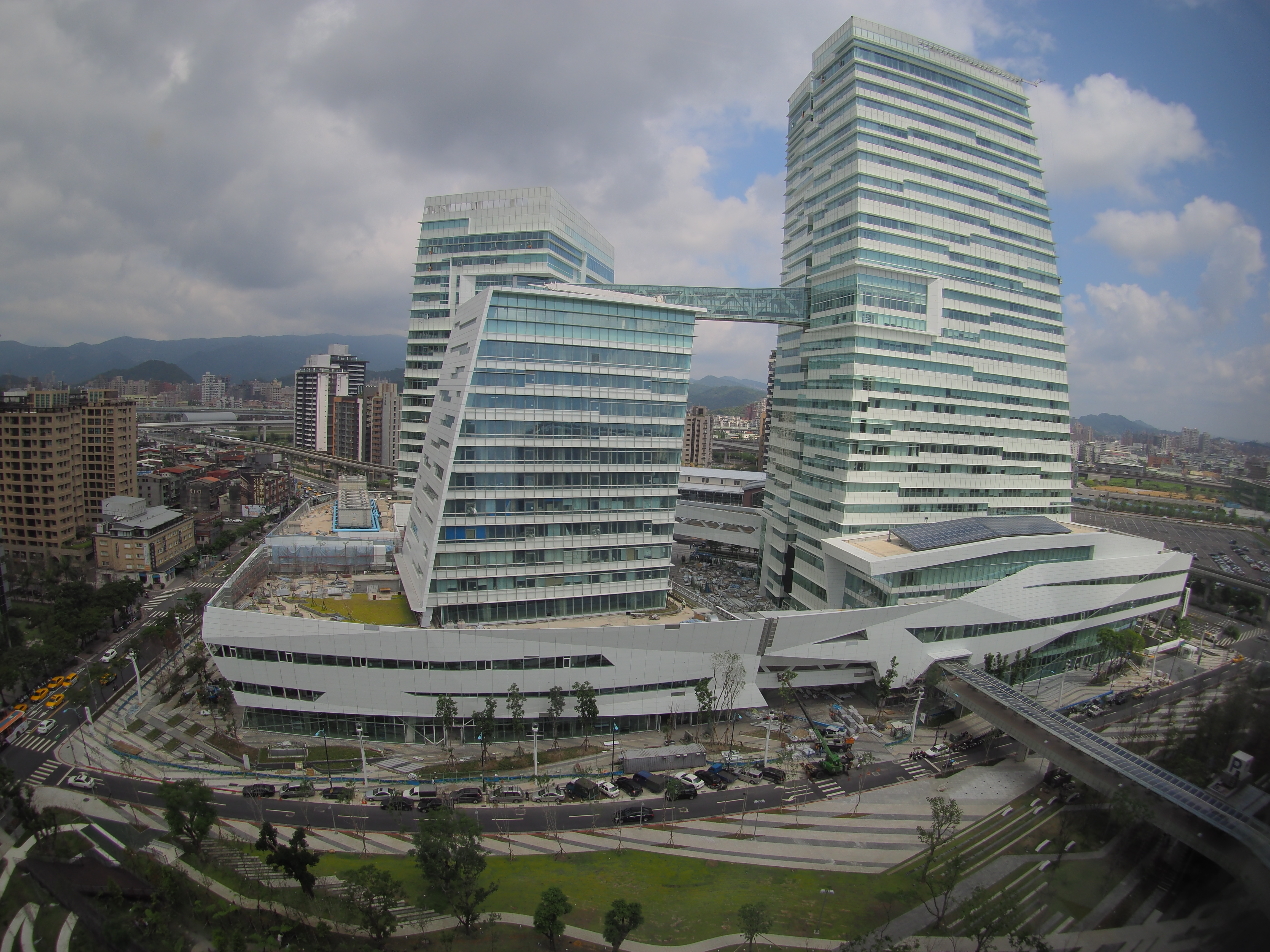 中文（台灣）: 俯瞰接近完工的中國信託金融園區。